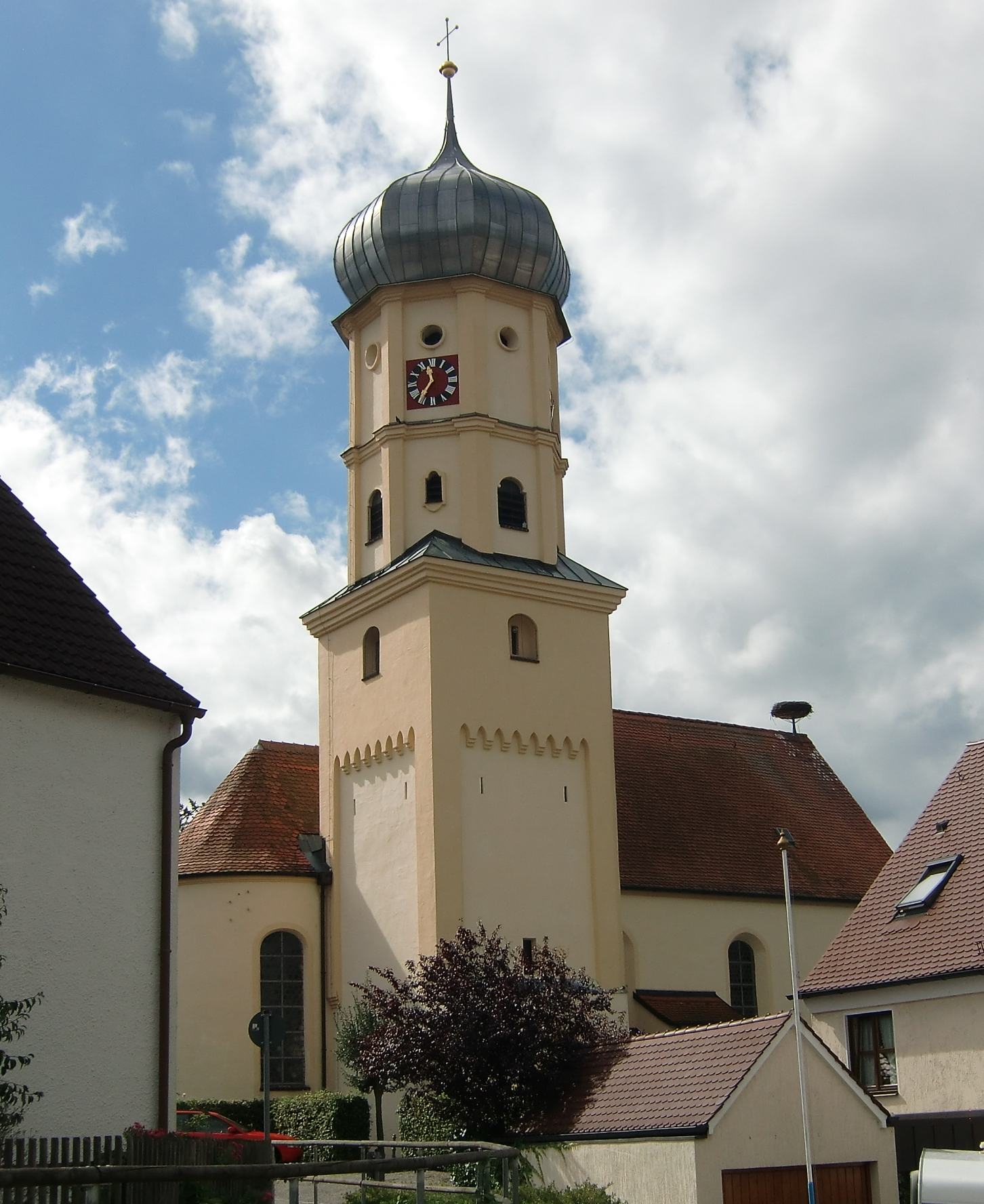 alte katholische Kirche St. Bartholomäus mit Storchennest. 86420 Diedorf, Kirchenweg